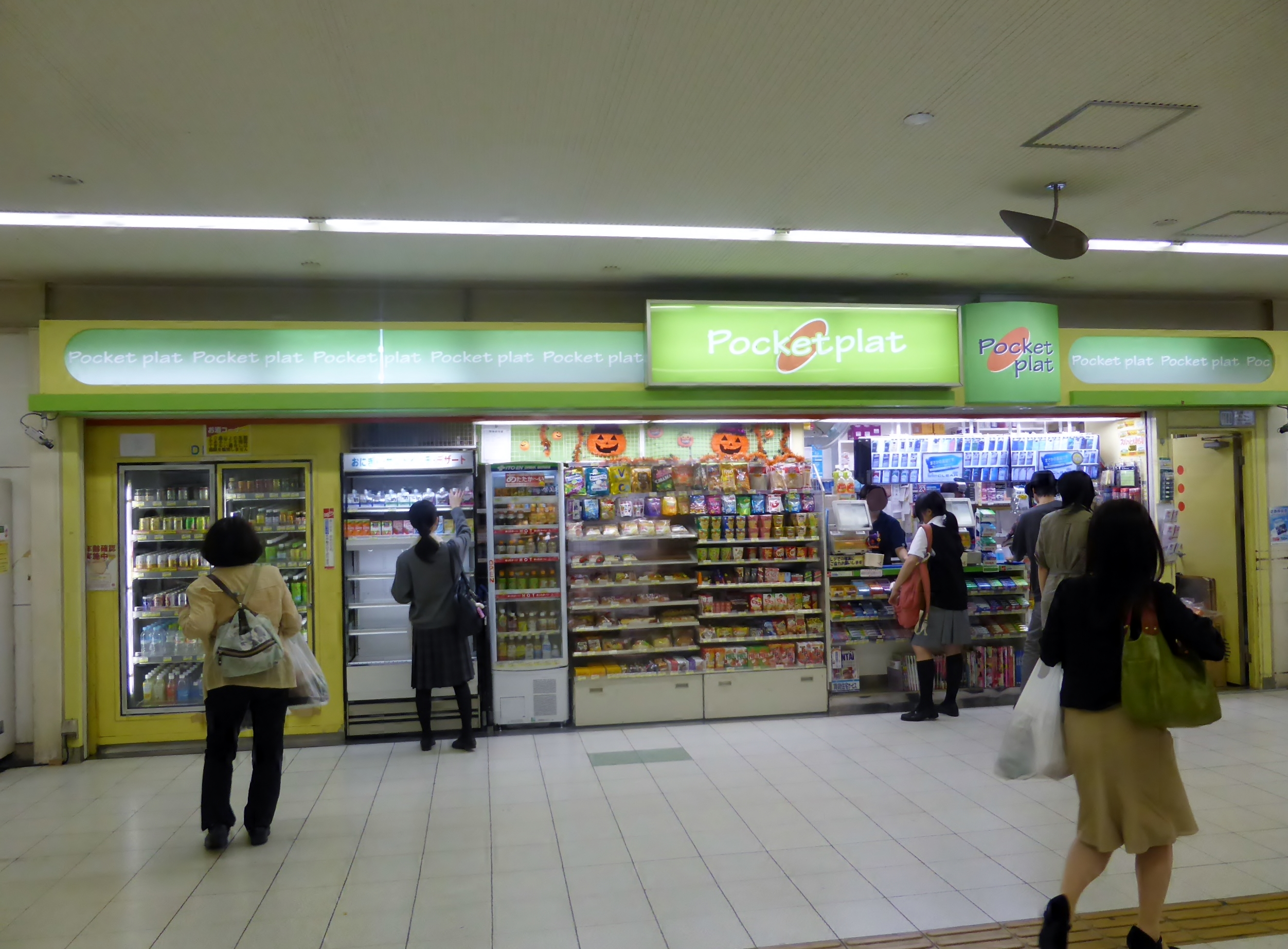 Pocketplat生駒2号売店を撮影。